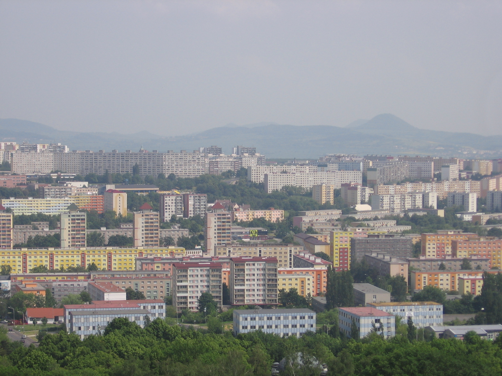 město Most z kopce Ressl